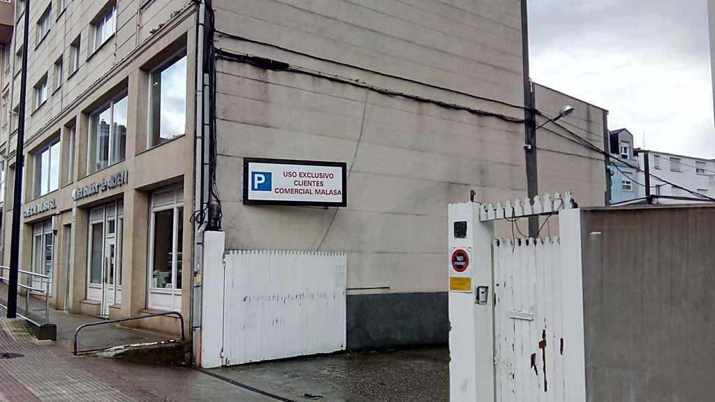 Comercial Malasa, O Temple.